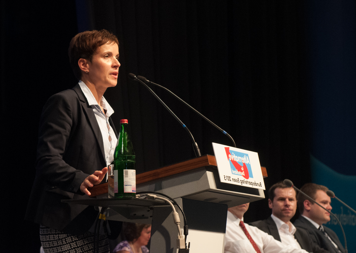 a.o. Bundesparteitag der Alternative für Deutschland, 4. Juli 2015 in Essen, Gruga Halle a.o. Bundesparteitag der Alternative für Deutschland am 4./5. Juli 2015 in Essen, Gruga Halle